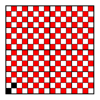 Bindungspatrone Leinwandbindung (Original text: Das Bild zeigt die Bindungspatrone für eine Leinwandbindung (farbige Felder=Kettfäden; weiße Felder=Schussfäden oben; schwarze Felder=Rapport).) Andere Versionen